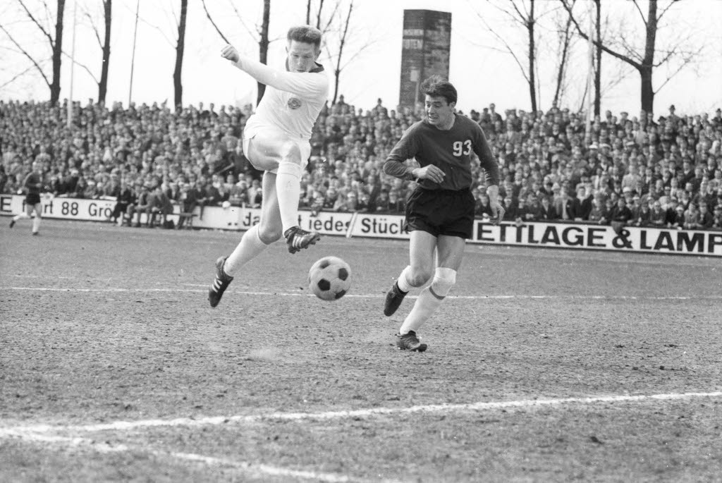 im Holsteinstadion. Im Bild u.a. Holsteins Stürmer Gerd Koll (links).